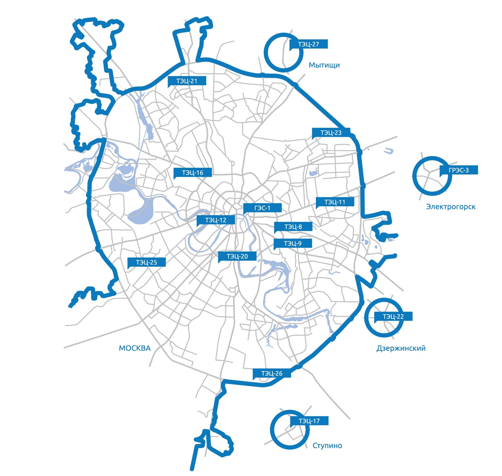 Электростанции «Мосэнерго» в Москве и Московской области